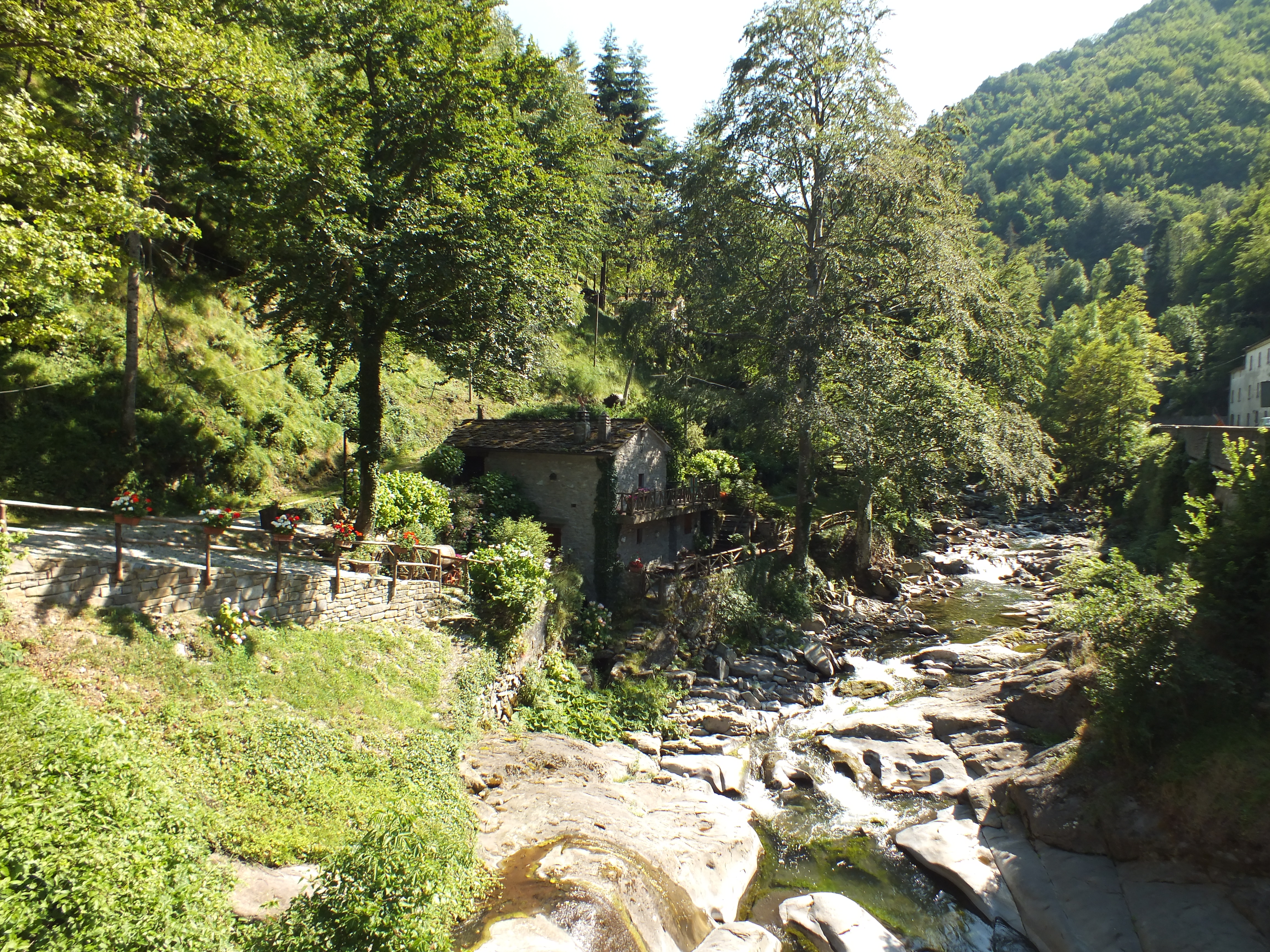 Vecchio mulino nei pressi di Corniolo